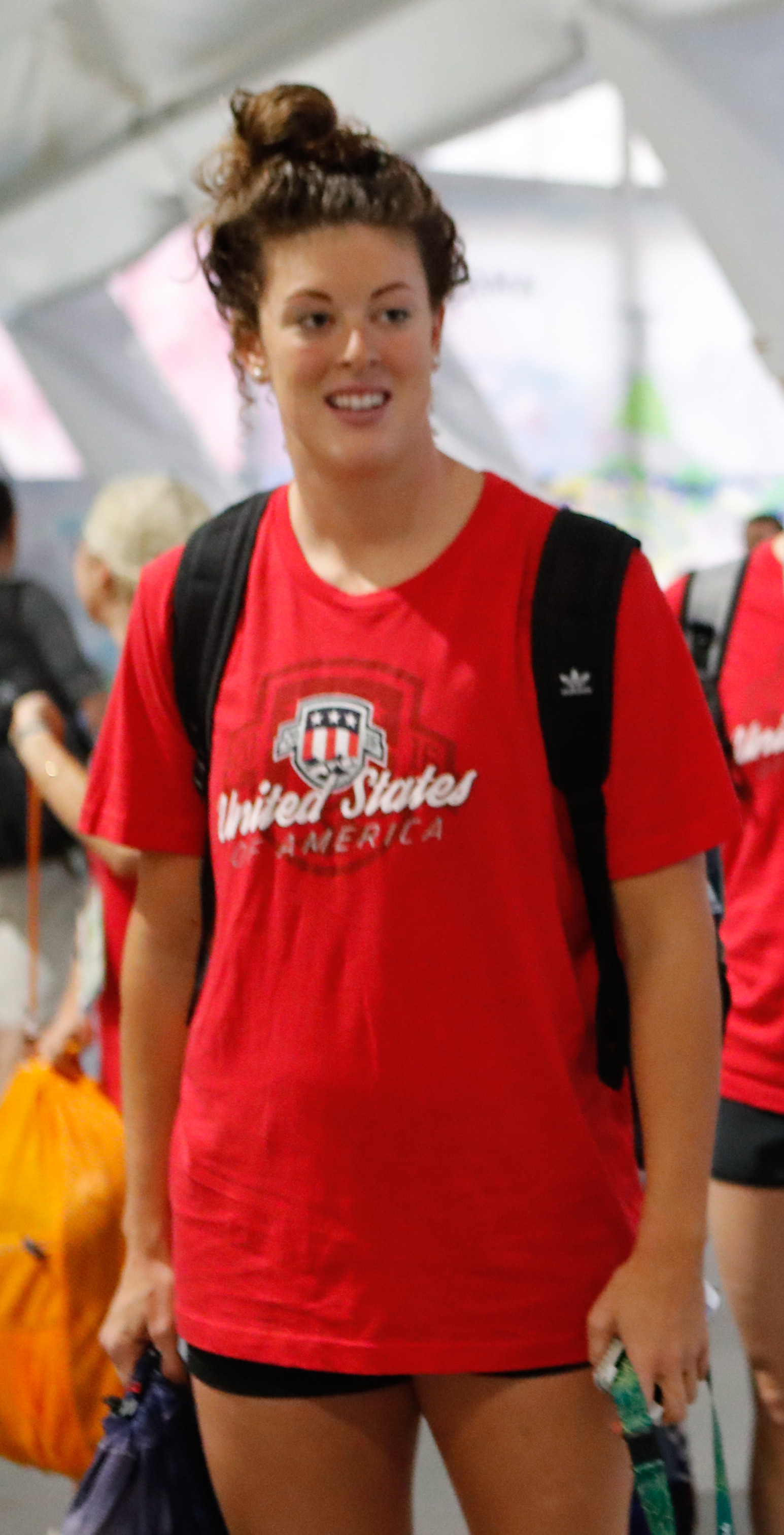 Rio de Janeiro - A nadadora Allison Schmitt, na Vila Olímpica dos Jogos Rio 2016 (Fernando Frazão/Agência Brasil)